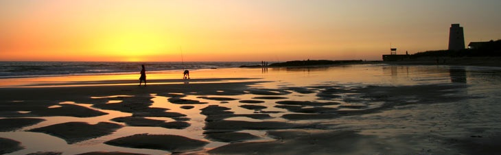 Panoramica del Palmar de vejer